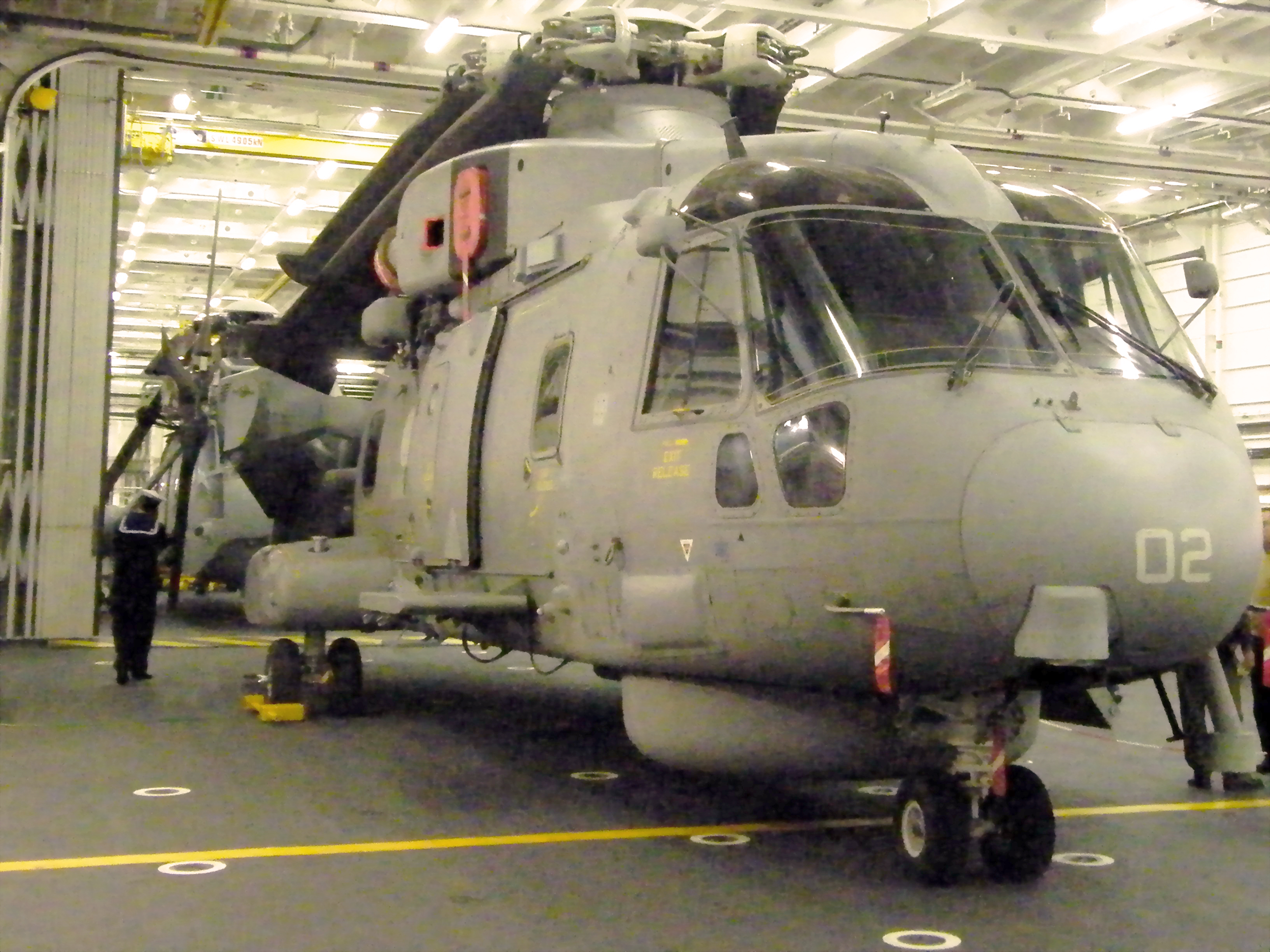 Elicottero EH101 di Maristaeli Luni nell'hangar del Cavour